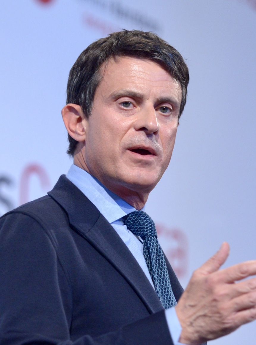 Pla detall del candidat a l'Ajuntament de Barcelona, Manuel Valls, durant la seva intervenció als Dinars Cambra on ha explicat el seu model de ciutat.